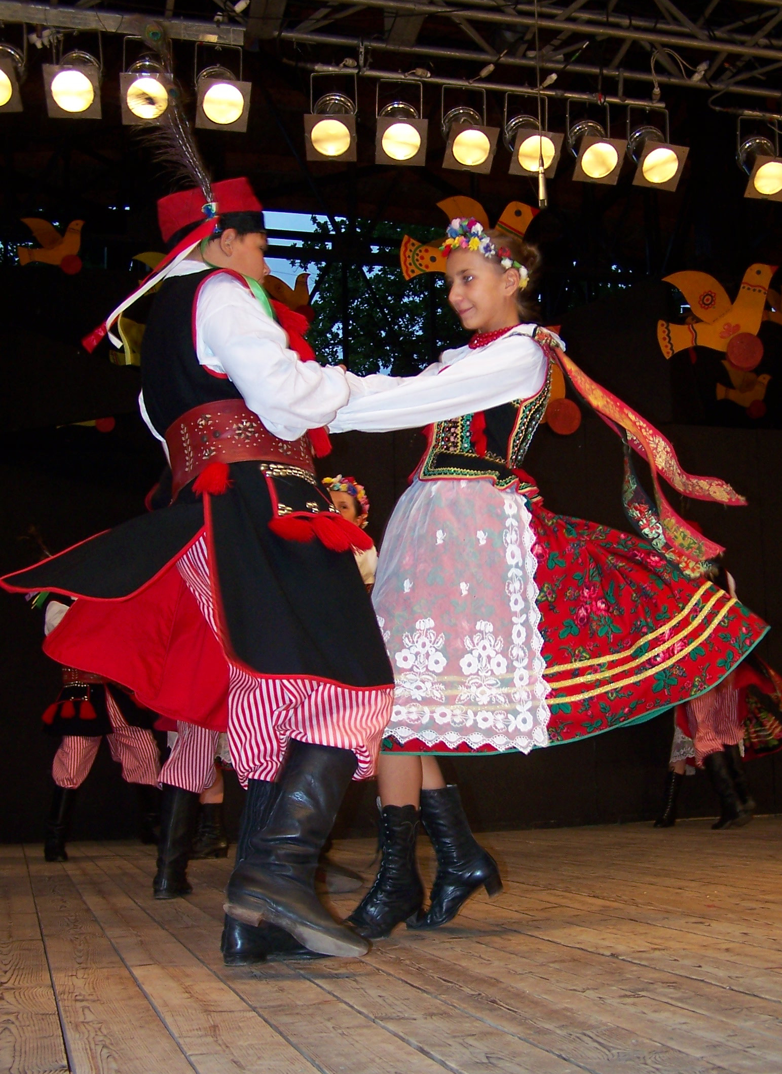 Występ zespołu Pilsko z Żywca podczas 43. Tygodnia Kultury Beskidzkiej w Żywcu.